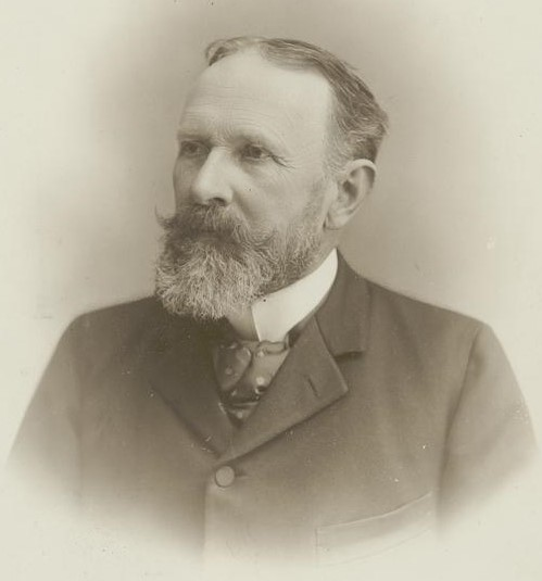 Porträt von Carl Spitteler, 1905. Fotografie : Silbergelatine ; 14,6 x 10,4 cm (Zentralbibliothek Zürich)